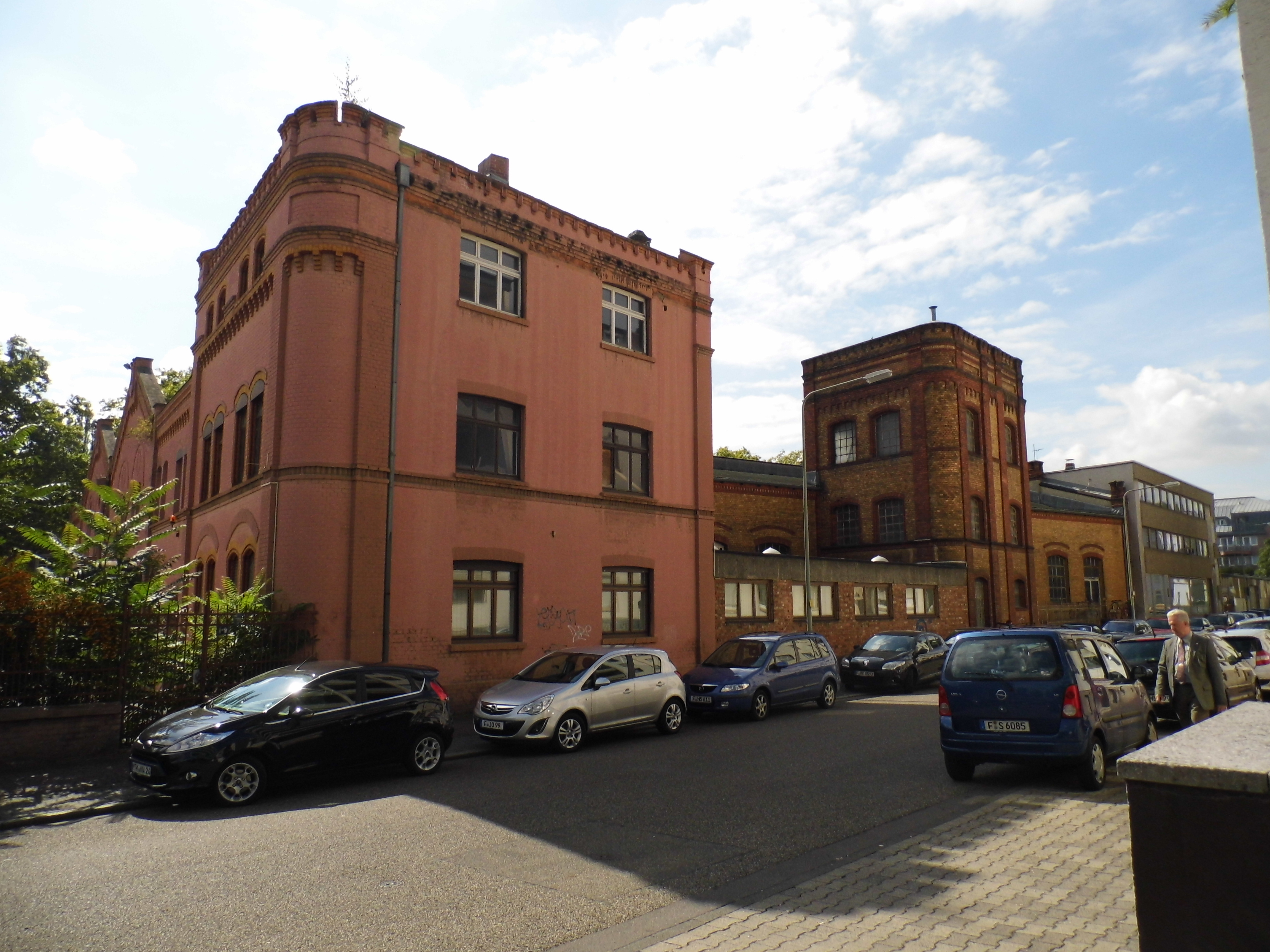 Frankfurt, Bockenheim, E-Werk, von Ohmstraße aus fotografiert. Der heute unter Denkmalschutz stehende gelbe Klinkerbau mit roten Lisenen und abgesetzten Blendbögen wurde bereits 1892 an der Kuhwaldstraße errichtet, um mit dem Elektrizitätswerk den rasant anwachsenden Energiebedarf der rasch wachsenden Industrie von Bockenheim, speziell an der Solmsstraße zu decken. Das E-Werk befindet sich hinter einer symmetrischen Giebelfassade an der Kuhwaldstraße, während sich das ehemalige Verwaltungsgebäude und die Kondensationsanlage mit ihrer turmartigen Ausführung an der Ohmstraße befinden. Der Kamin wurde auf einen kunstvoll gemauerten Sockel errichtet. Bauherr dieses ersten Elektrizitätswerkes im heutigen Stadtgebiet von Frankfurt-Bockenheim war Friedrich Wilhelm Lahmeyer (1859-1907), ein deutscher Elektroindustrieller. Sein Unternehmen wurde im gleichen Jahr in eine Aktiengesellschaft umgewandelt. Die Elektrizitäts-AG vormals W. Lahmeyer & Co. (EAG) bestand als ein Unternehmen der Elektroindustrie mit Sitz in Frankfurt am Main bis ins Jahr 2000. Dann verschmolz die Lahmeyer AG endgültig mit ihrer Mutter RWE und die Firma Lahmeyer AG erlosch. Der Name Lahmeyer wird heute nur noch von der ehemaligen Tochter Lahmeyer Internationa weitergeführt. Das unter Denkmalschutz stehende Objekt ist schon länger funktionslos und leer. Eigner ist seit 1989 Bernd F. Lunkewitz, ein deutscher Immobilieninvestor und Verleger. Er hatte bereits den Frankfurter Architekten Christoph Mäckler mit einen, nicht realisierten, Entwurf eines Umbaus beauftragt. Zurzeit kann das Gebäude für Veranstaltungen gemietet werden.